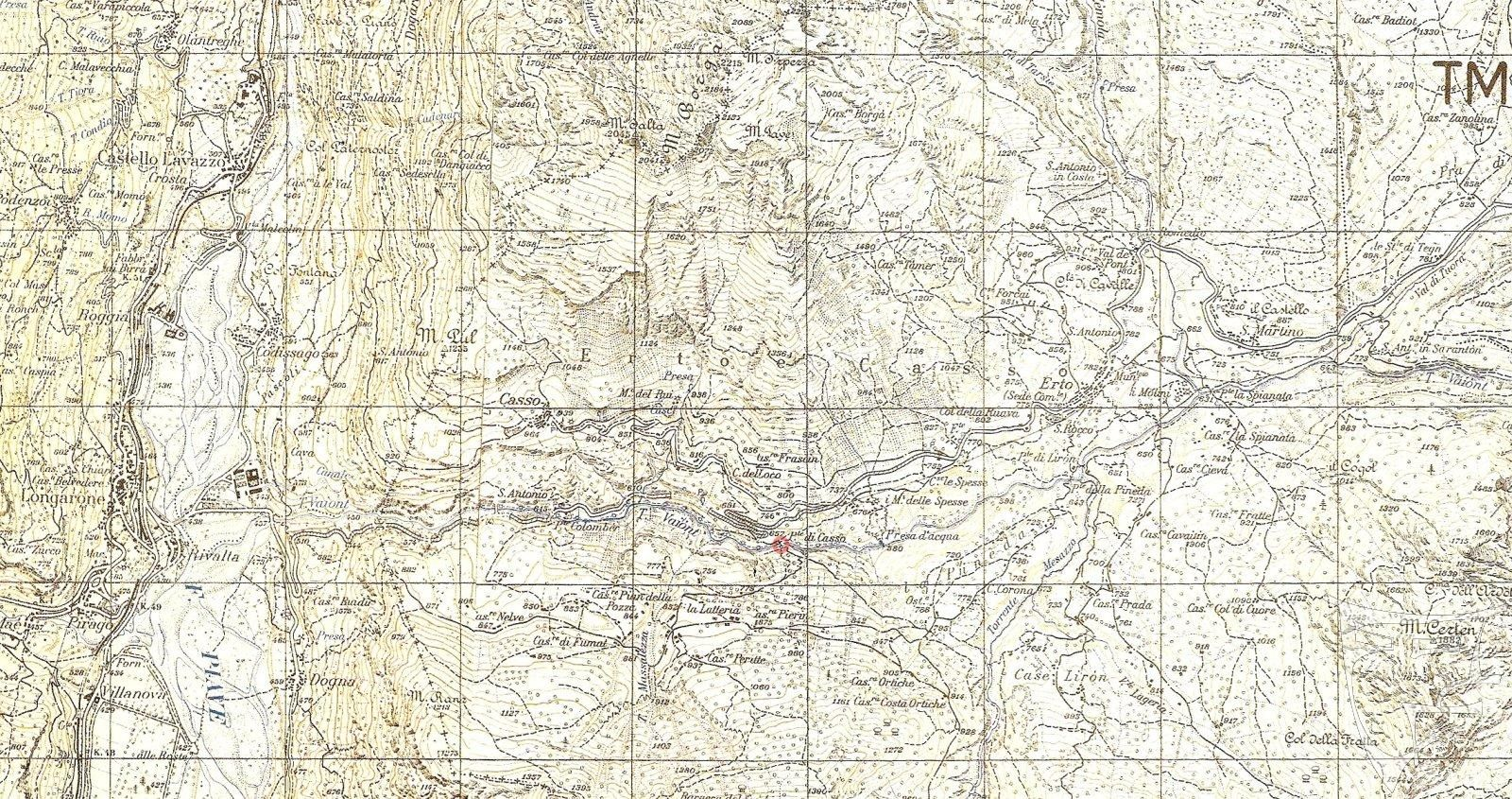 Mappa dell'IGM della Valle del Vajont nel 1934.